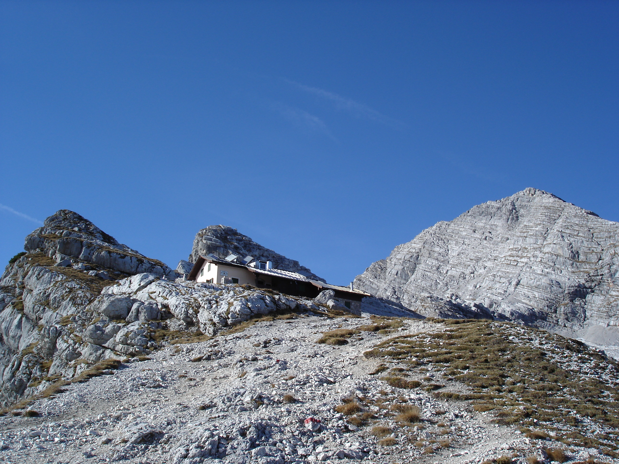 Birnhorn und Passauerhütte in den Leoganger Steinbergen im Spätherbst 2005